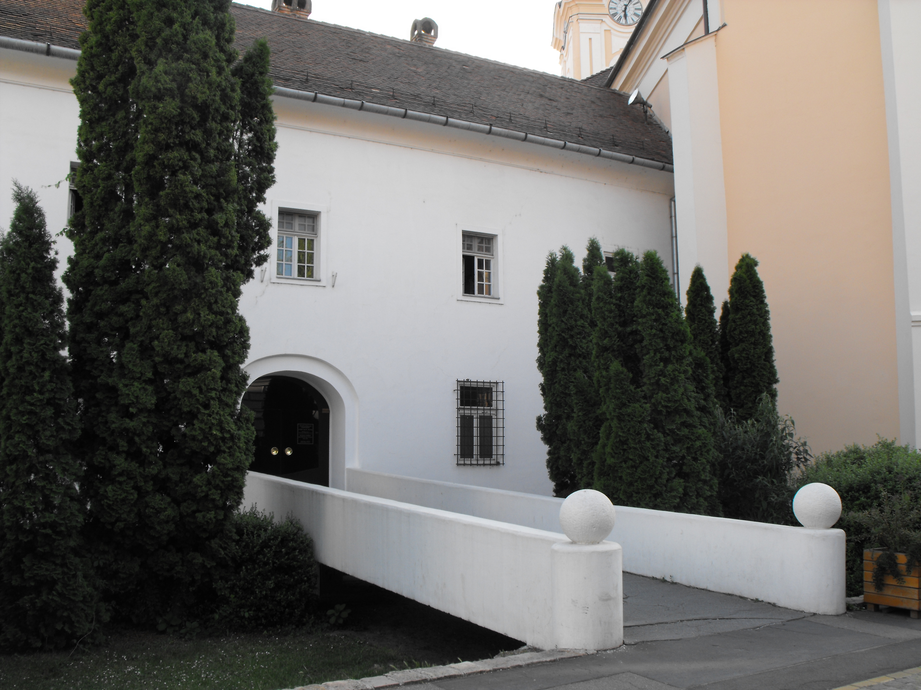 Kodály Zoltán Zenepedagógiai Intézet, volt Ferences kolostor, Kecskemét (épült 1702 és 1736 között több szakaszban, középkori épületrészek és alapfalak felhasználásával)